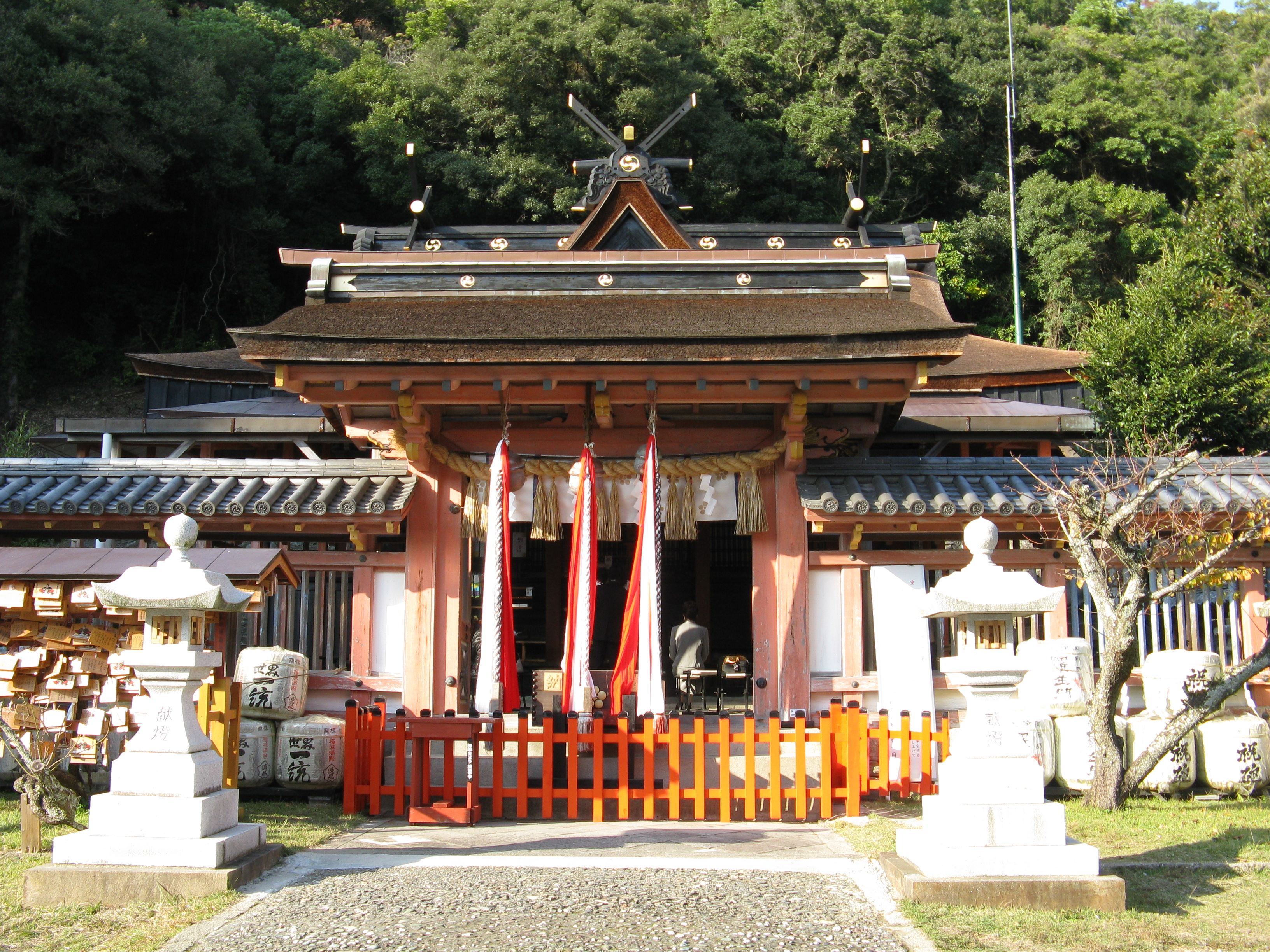 和歌浦天満宮 前拝殿